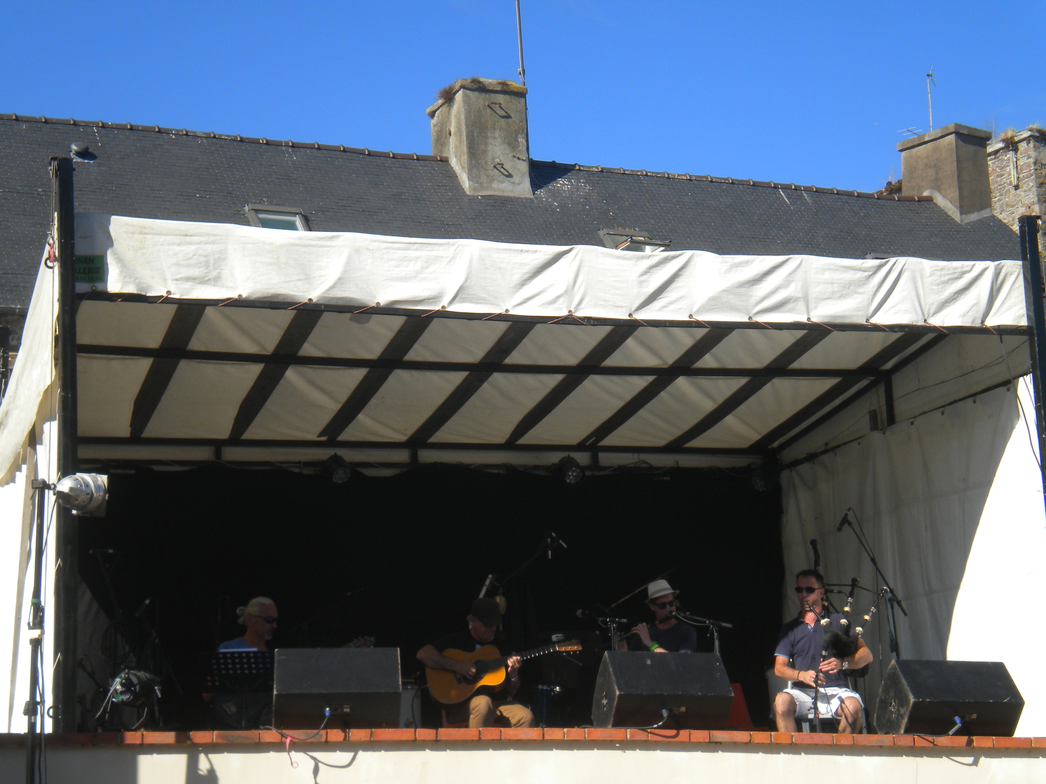 Pontrev, Fest ar Gannerezed, Sonadeg